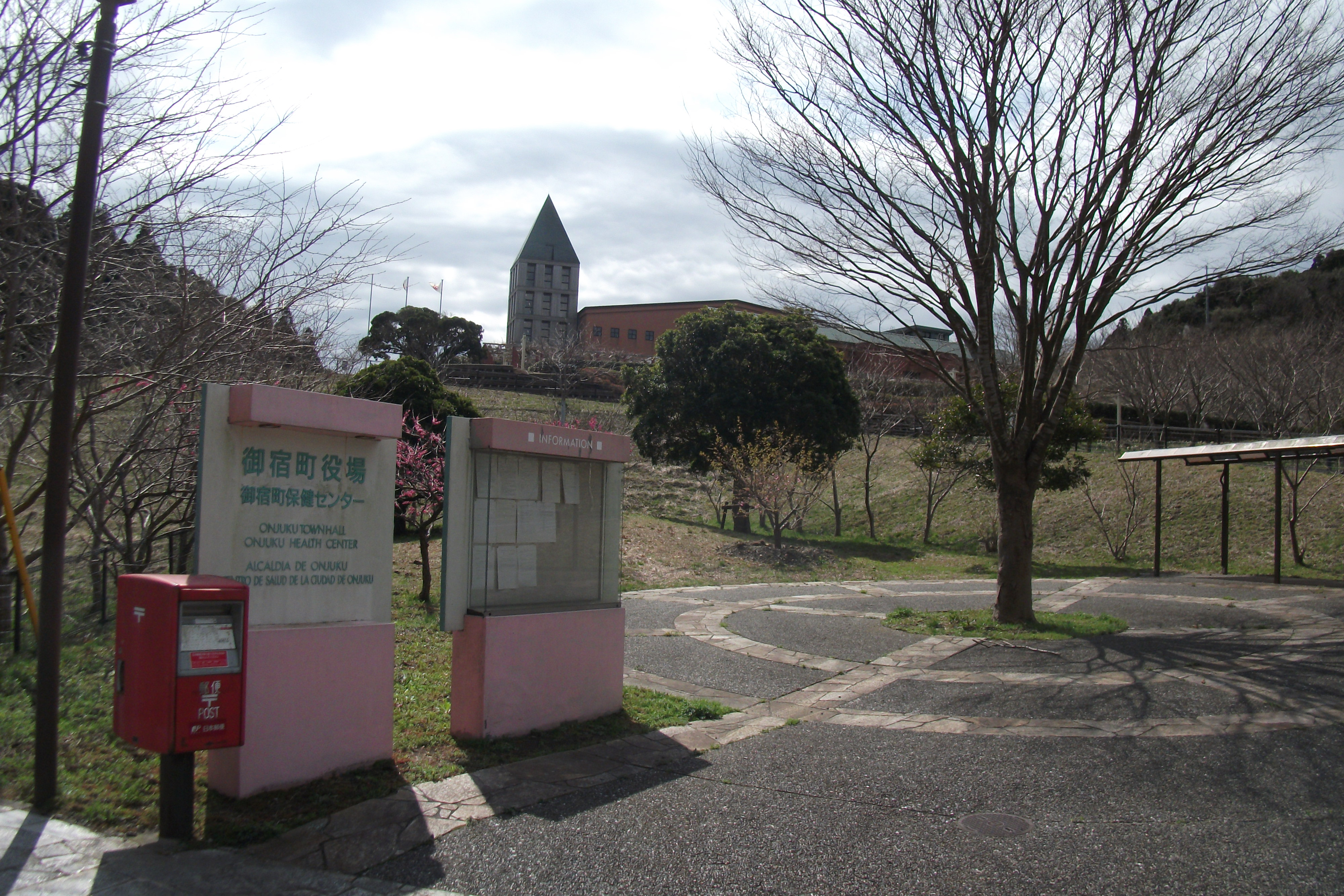 千葉県夷隅郡御宿町役場